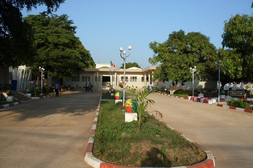 le batiment de l'Hotel de ville de Natitingou construit en 2011